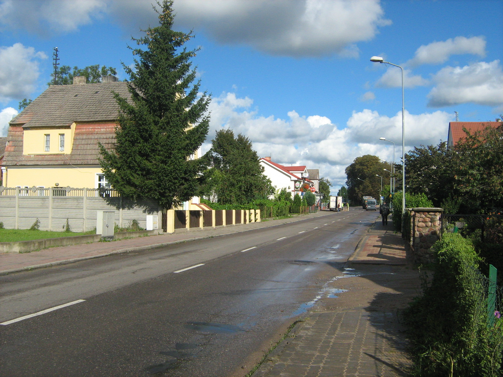 Gościno, ul. IV Dywizji Wojska Polskiego.